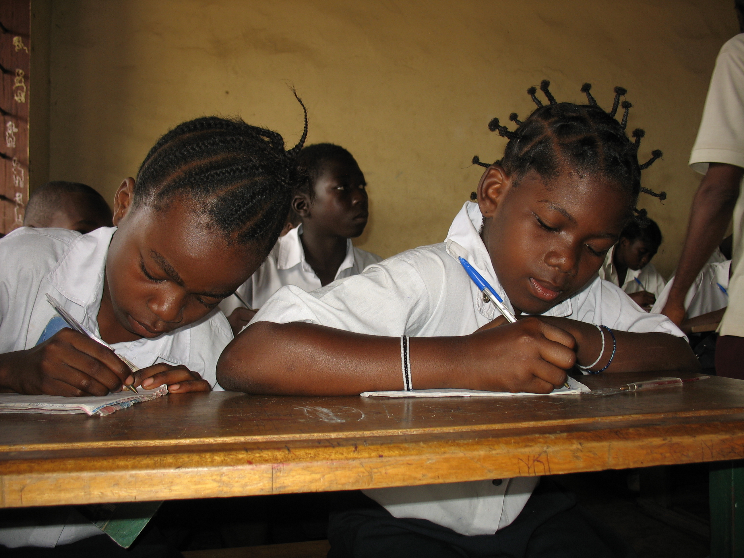 Szorgalmas diákok a College Othnielben